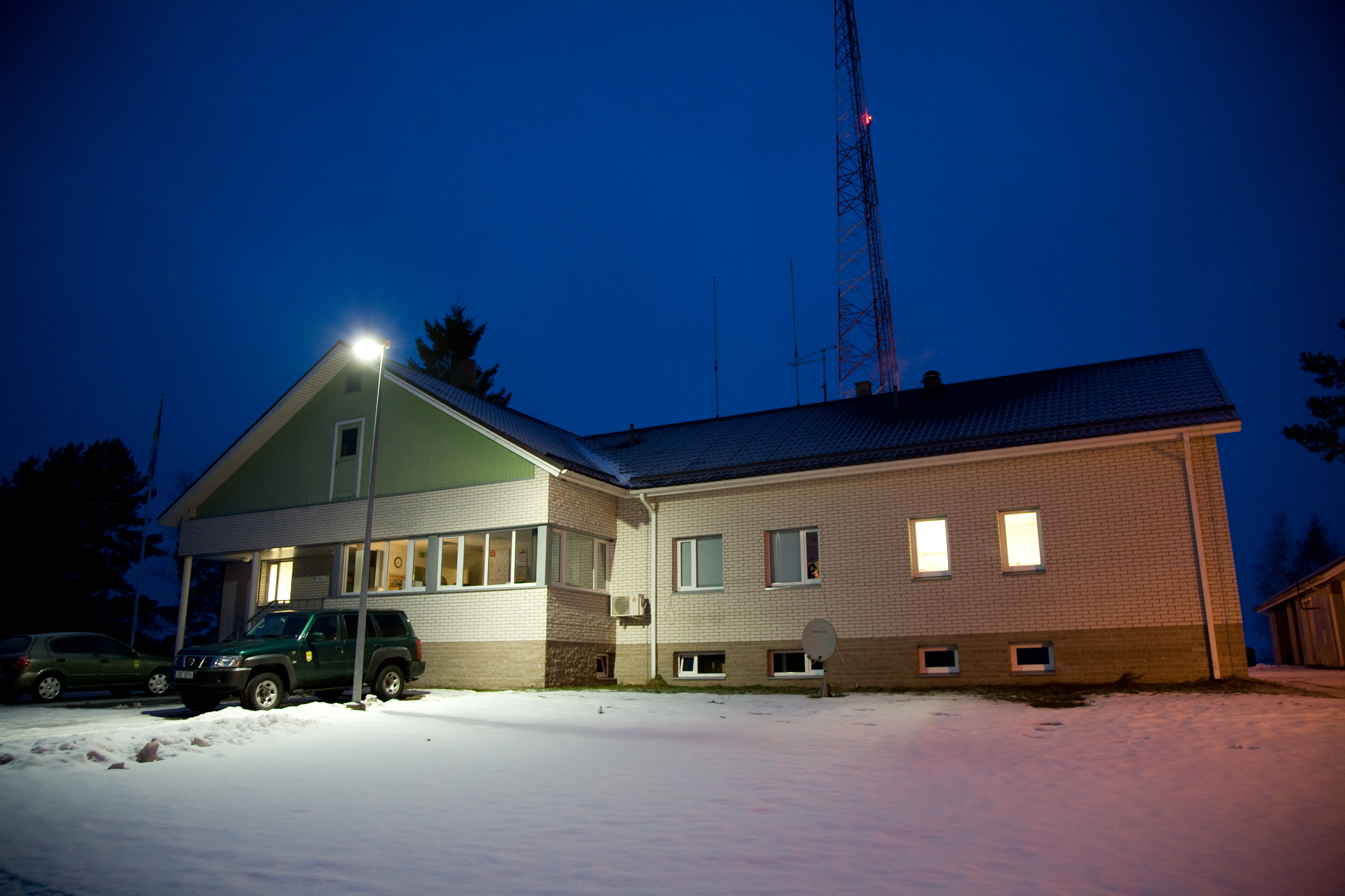 Värska kordon